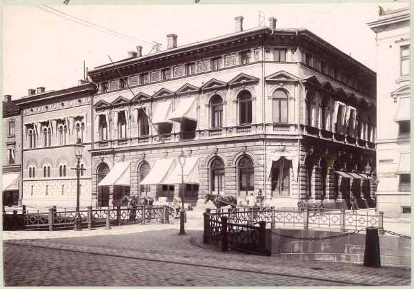 Västra Hamngatan 6 - Drottninggatan 10. Svenska Kreditaktiebolagets hus. Foto från 1901. I förgrunden Västra Drottninggatubron.Göteborgs stadsmuseum GhmPK:892.